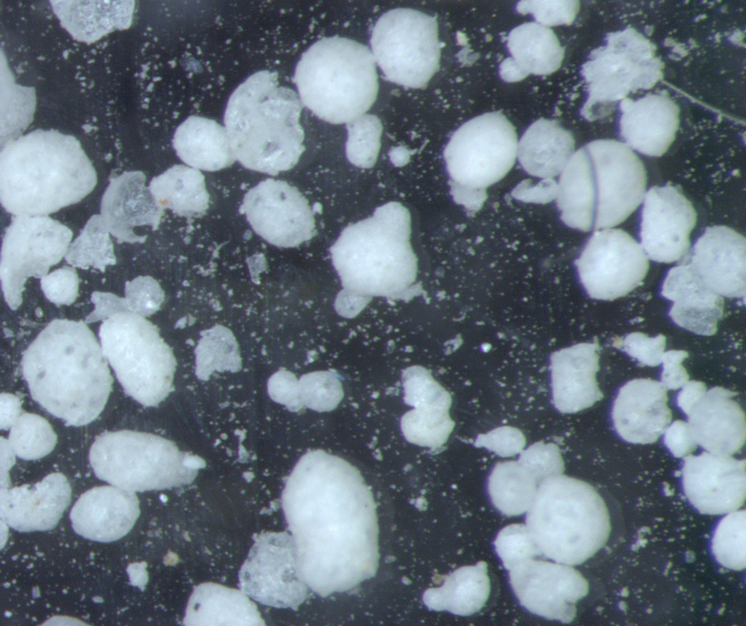 Blähglas unterm Mikroskop